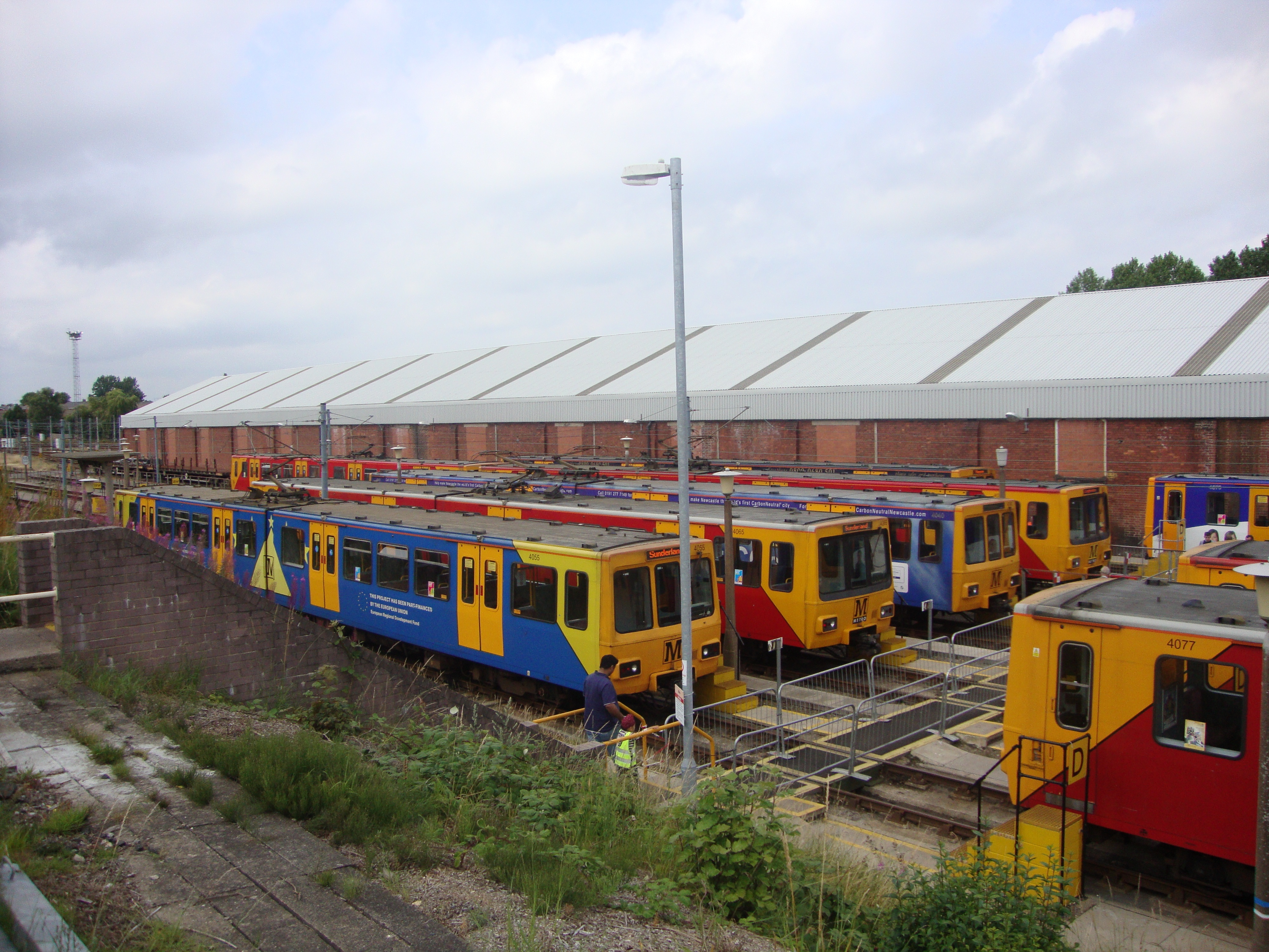 Metro Depot Yard